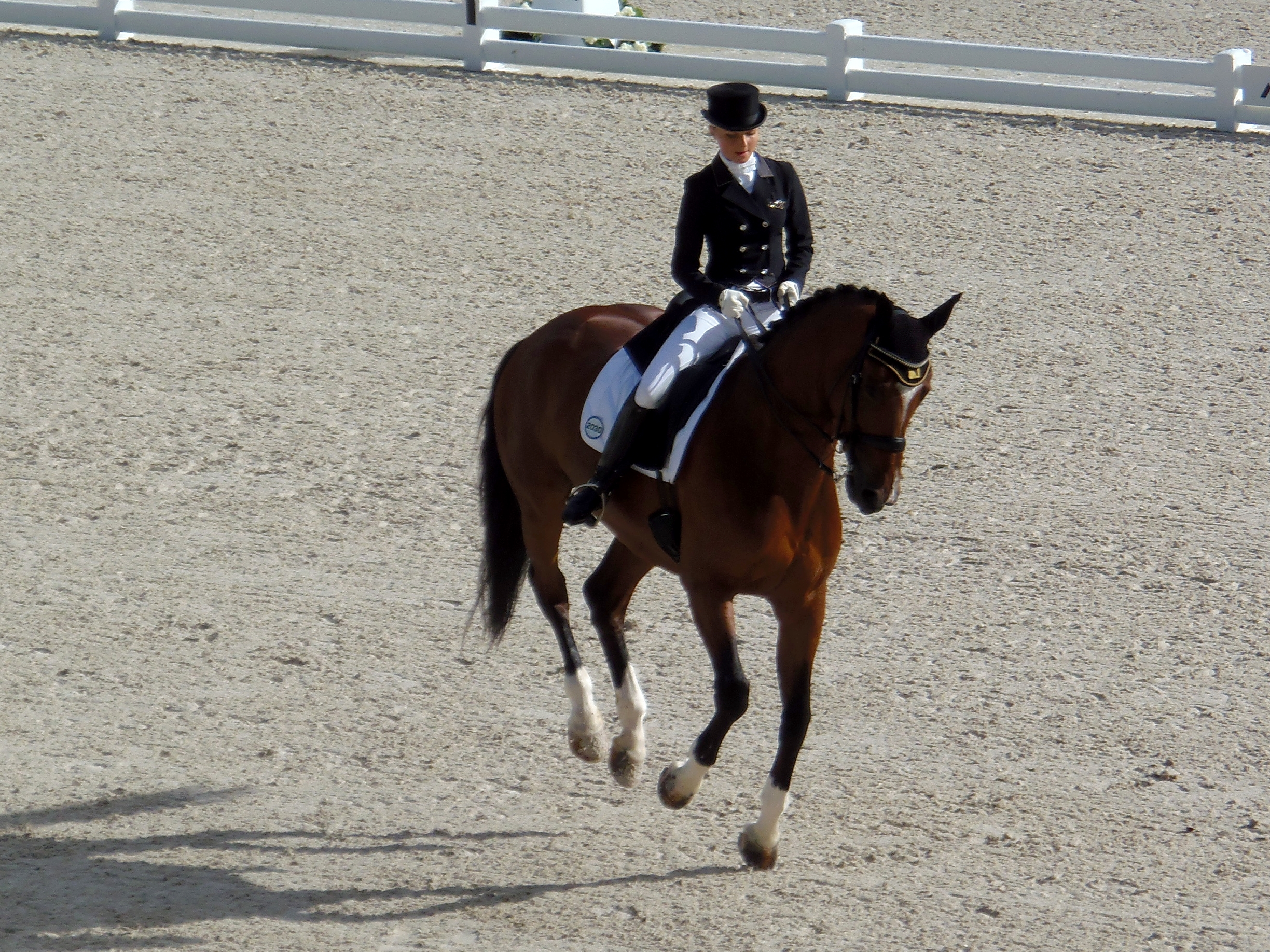 Grete Püvi-Barake en selle sur Talent lors des Jeux équestres mondiaux, le 26 août 2014 au stade d'Ornano à Caen (Normandie, France).